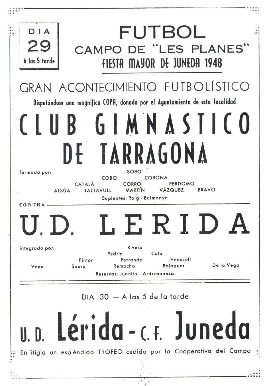 Cartell de Festa Major del C.F. Juneda (any 1948)